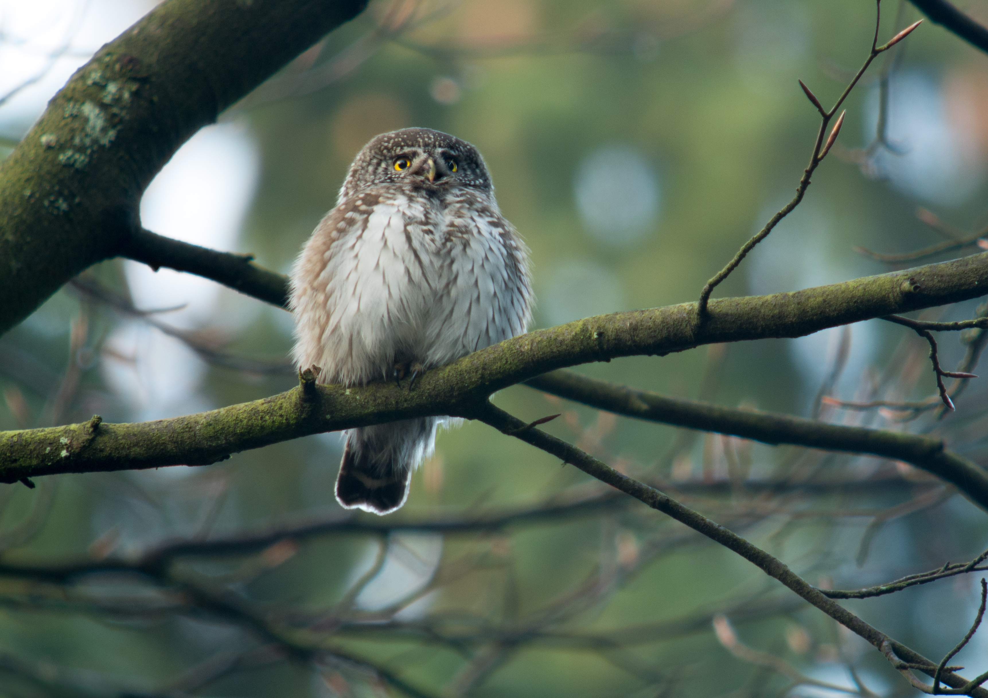 Digiscoping with Swarovski ATM 80 HD 30 X, Nikon 1V1 + 11-27,5 mm lens (Adapter DCB)